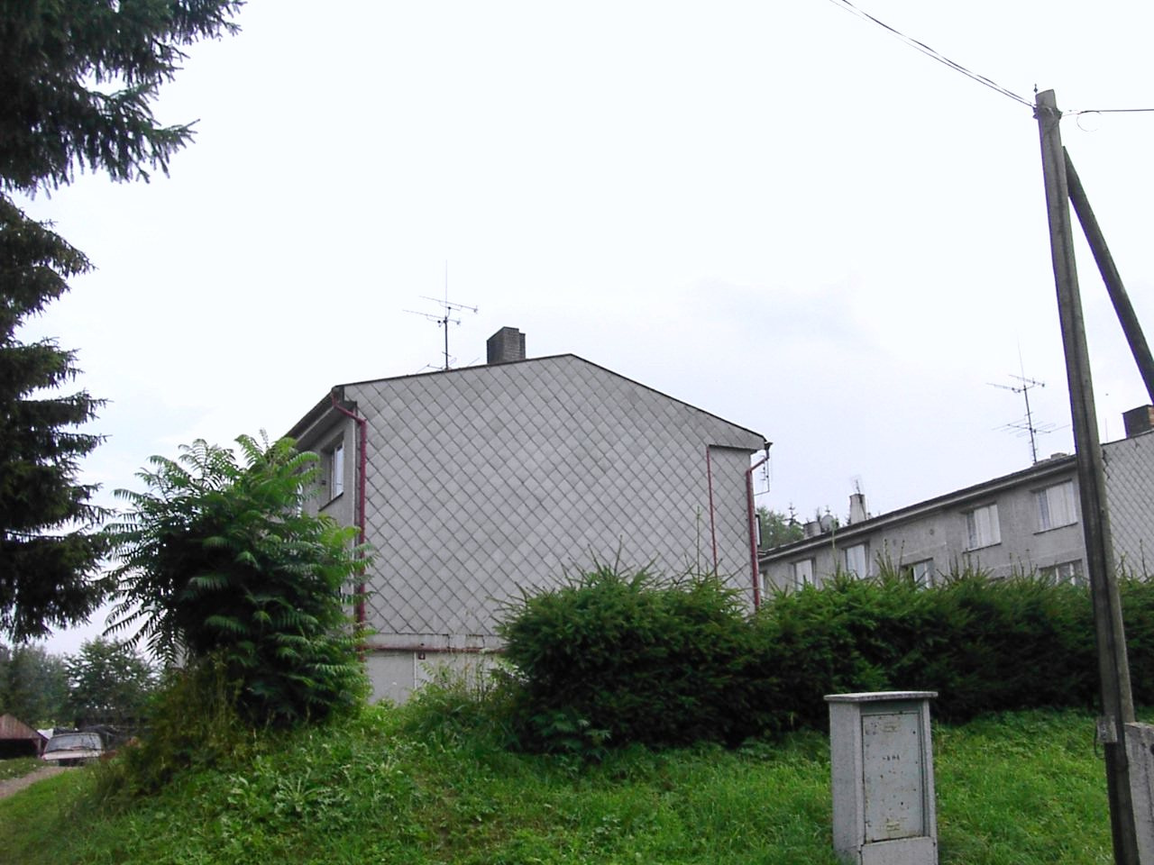 Bytovky v Nemanicí­ch.